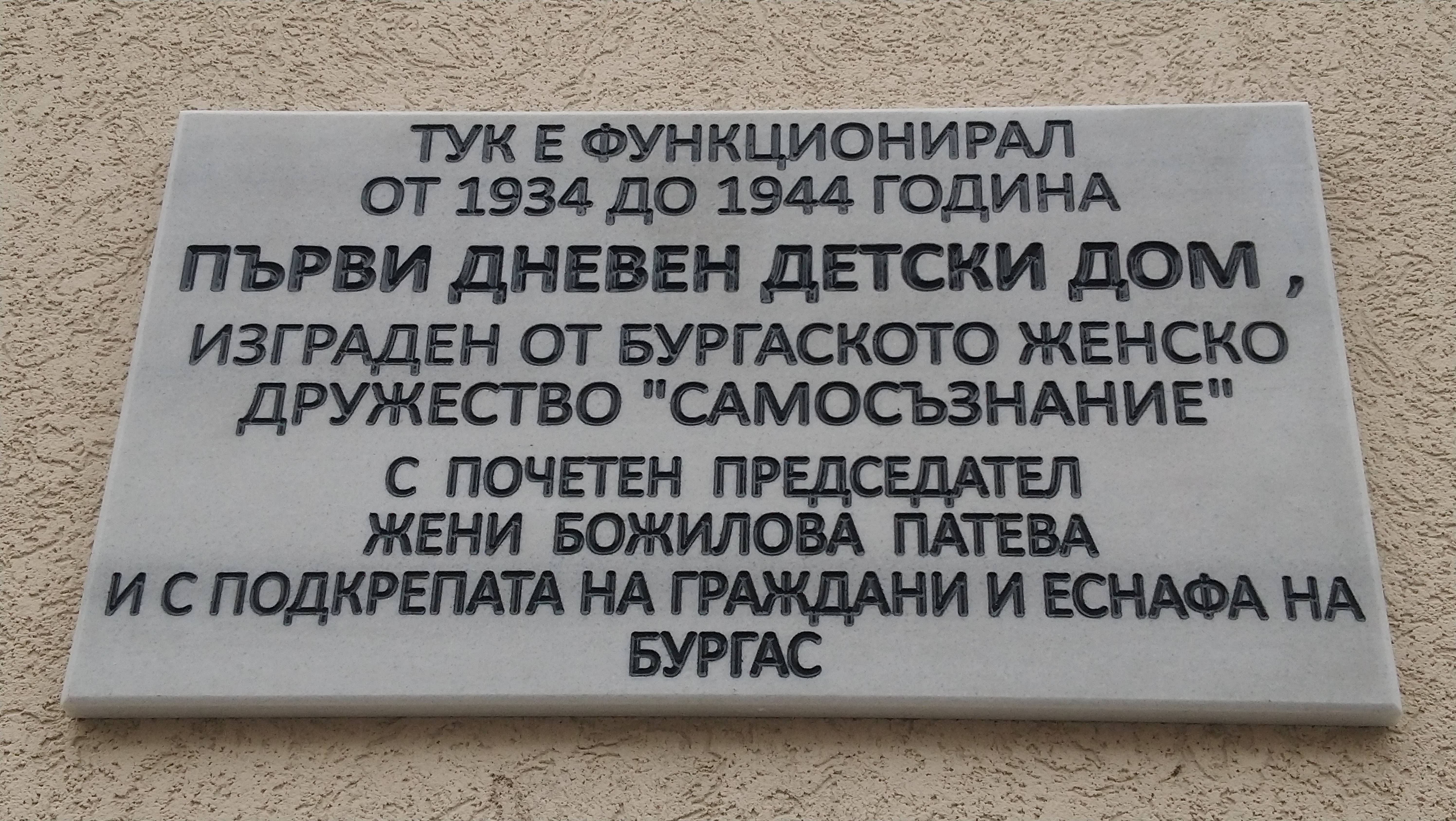 Паметна плоча на Дома на писателя, Бургас в памет на делото на Жени Божилова-Патева